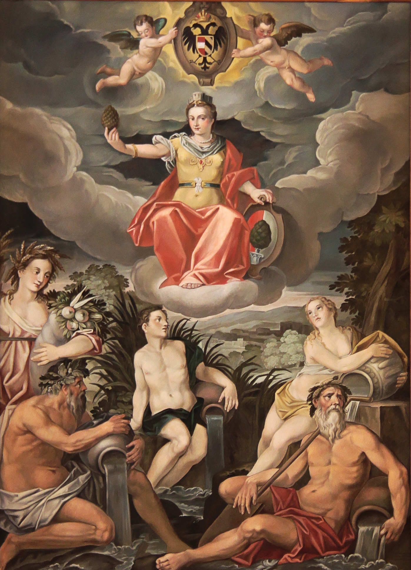 Wandbild im Goldenen Saal (Augsburg). Es ist eine Rekonstruktion des Werkes des Augsburger Künstlers Hans Rottenhammer, das über einem der Portale angebracht ist. Es zeigt eine auf einer Wolke schwebende, sitzende Kaiserin, die in der Linken das Augsburger Stadtwappen und in der Rechten eine Zirbelnuss hält. Über ihr schwebt von zwei Putten getragen das Reichsadler-Wappen. Im Vordergrund eine Frauengestalt mit Ähren und Früchten, sowie Personifikationen der vier Augsburger Flüsse Lech, Wertach, Singold und Brunnenbach, welche einen nie versiegenden Strom von Wasser aus ihren Krügen ausgießen.